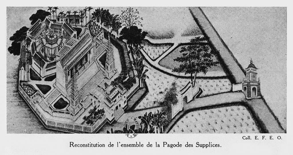 Sơ đồ mô tả chùa Báo Ân do trường Viễn đông Bác Cổ vẽ lại